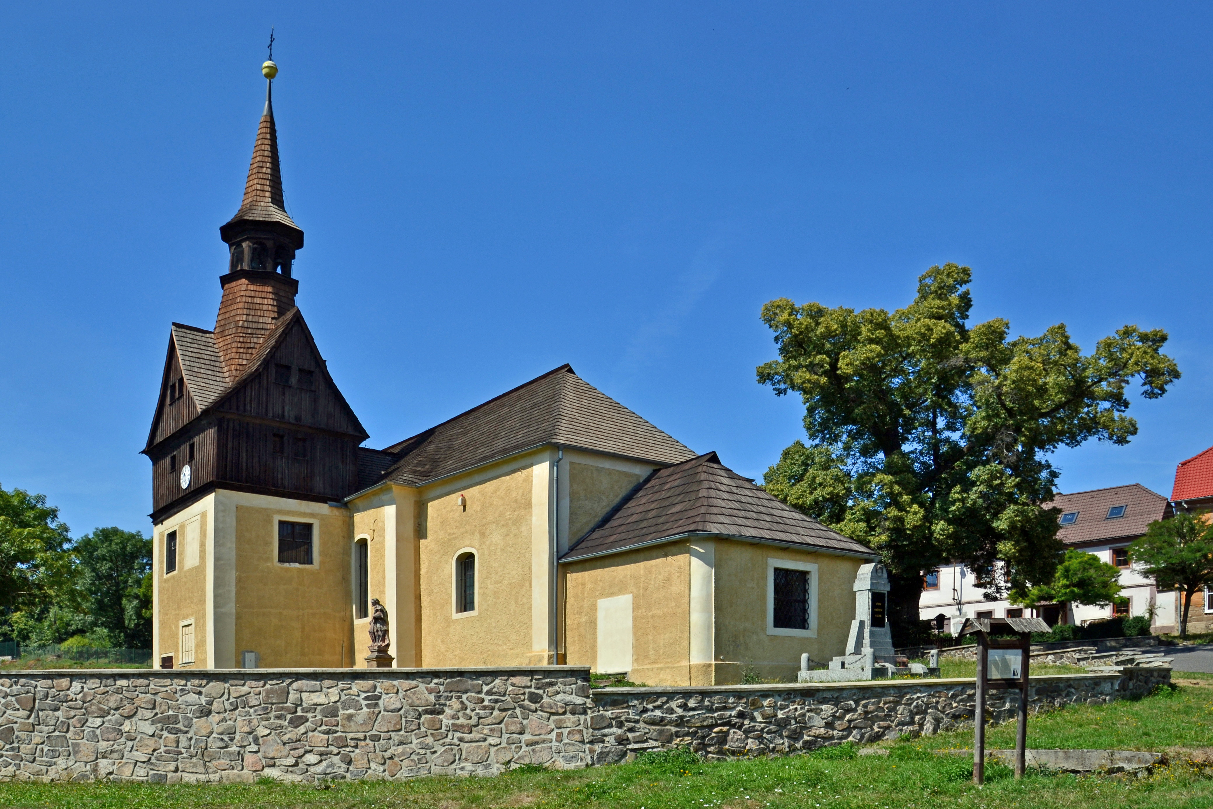 Kostel sv. Havla (Úhošťany), Úhošťany